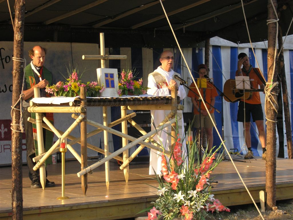 Abendgebet am Lageraltar mit Pater Marian Eleganti